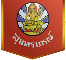 ตราสัญลักษณ์